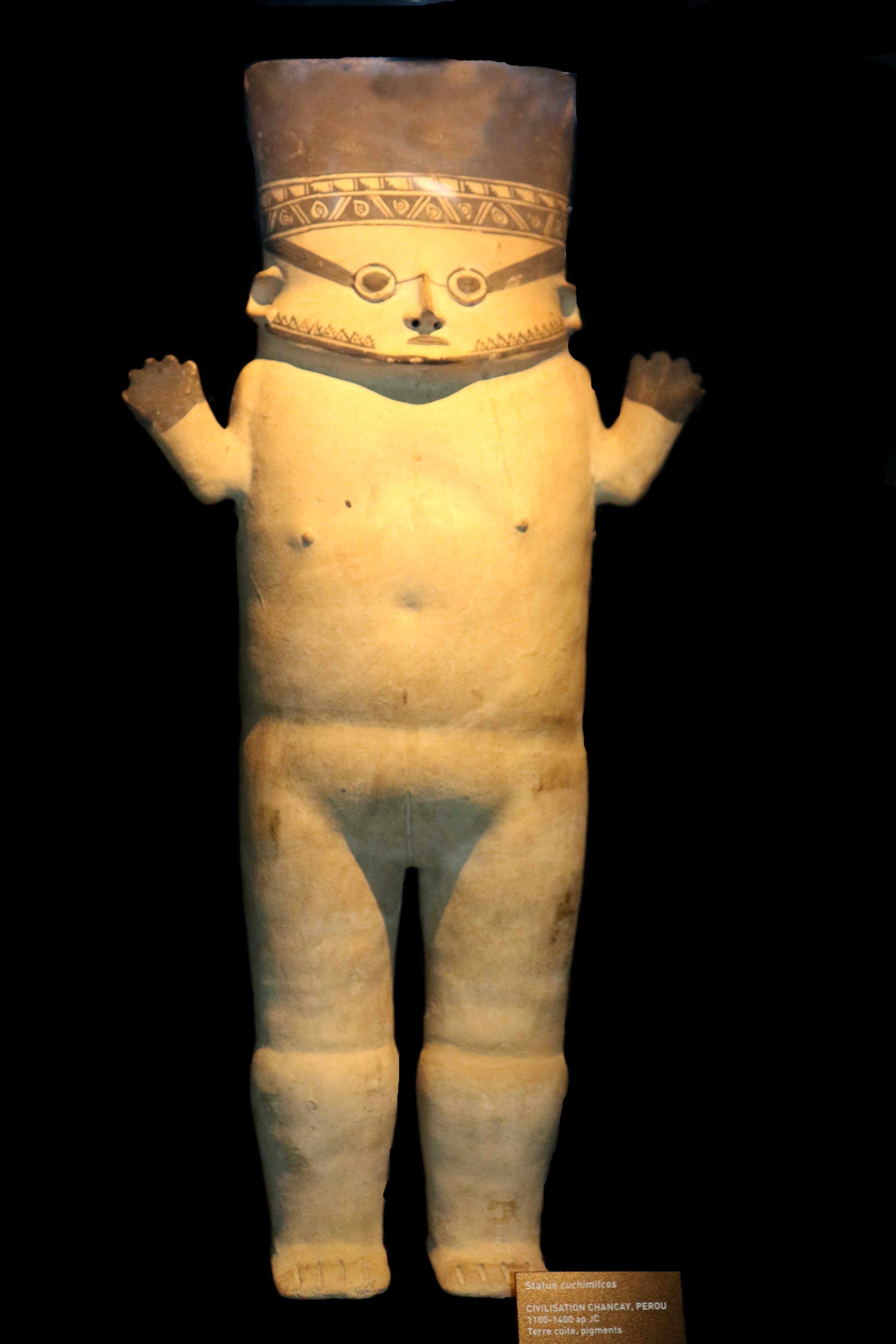 Musée des arts africains, océaniens et amérindiens à la Vieille Charité de Marseille, salle Océanie et Amériques : Statue Cuchimilcos de la civilisation Chancay Pérou, en argile et pigments, 63 cm de hauteur, (1100-1400 après J.C.)